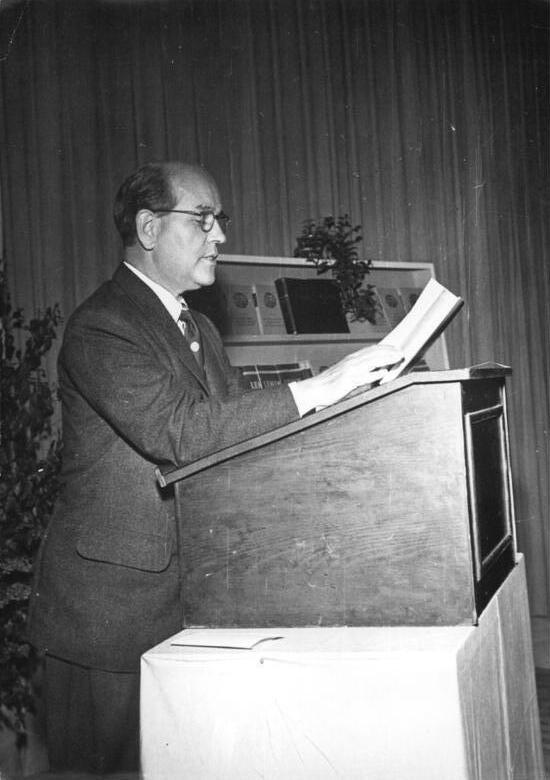 Zentralbild-Illner 17.5.1952 "Woche des Buches" in Leipzig. In der Ausstellung "das fortschrittliche Buch - ein Helfer im Friedenskampf" lasen Leipziger Schriftsteller und Dichter aus ihren Werken. UBz: Professor Wieland Herzfelde